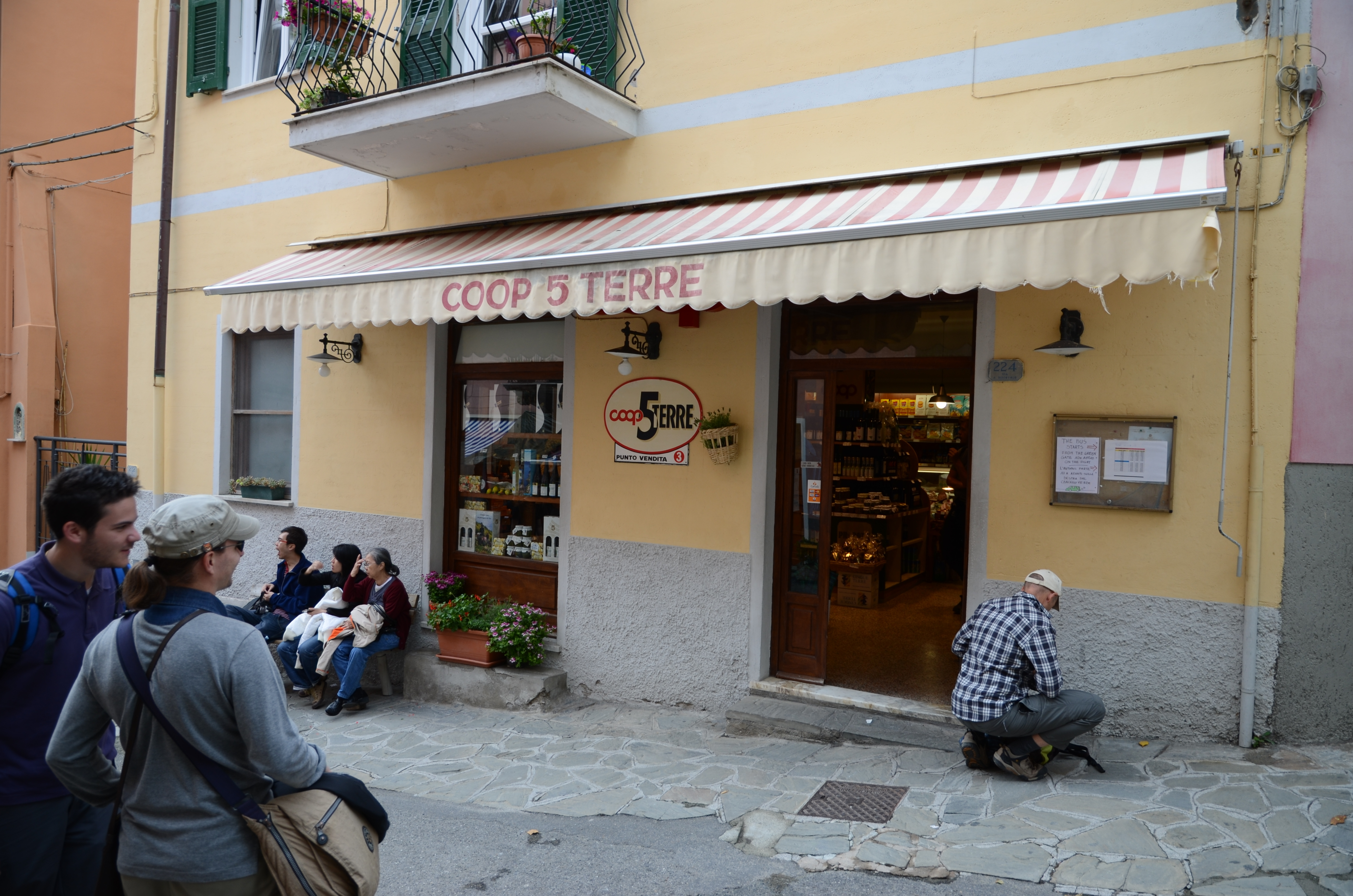 Boutique de la coop 5 terre